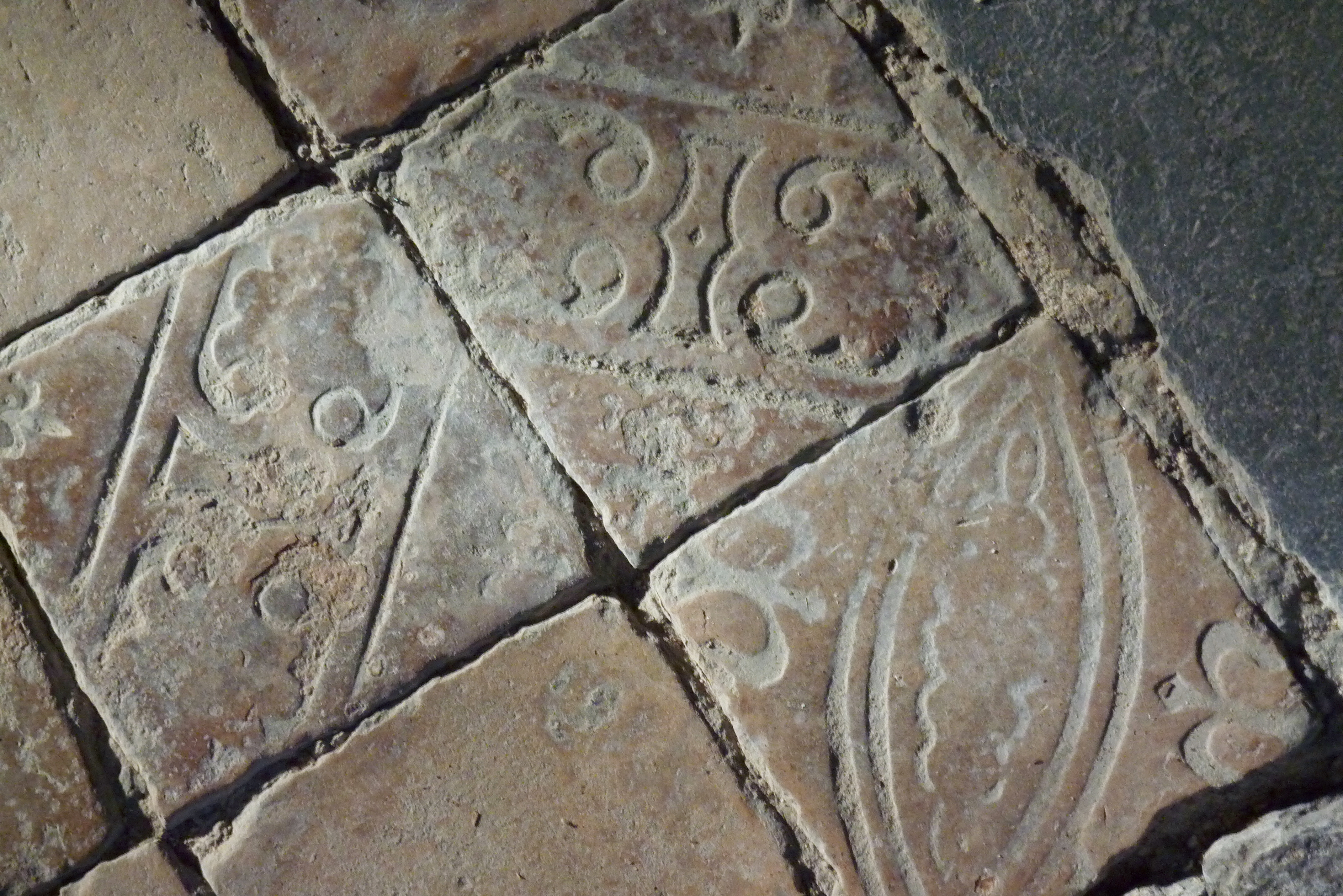 Tonfliesen in der Peterskapelle in Spay aus der zweiten Hälfte des 13. Jahrhunderts